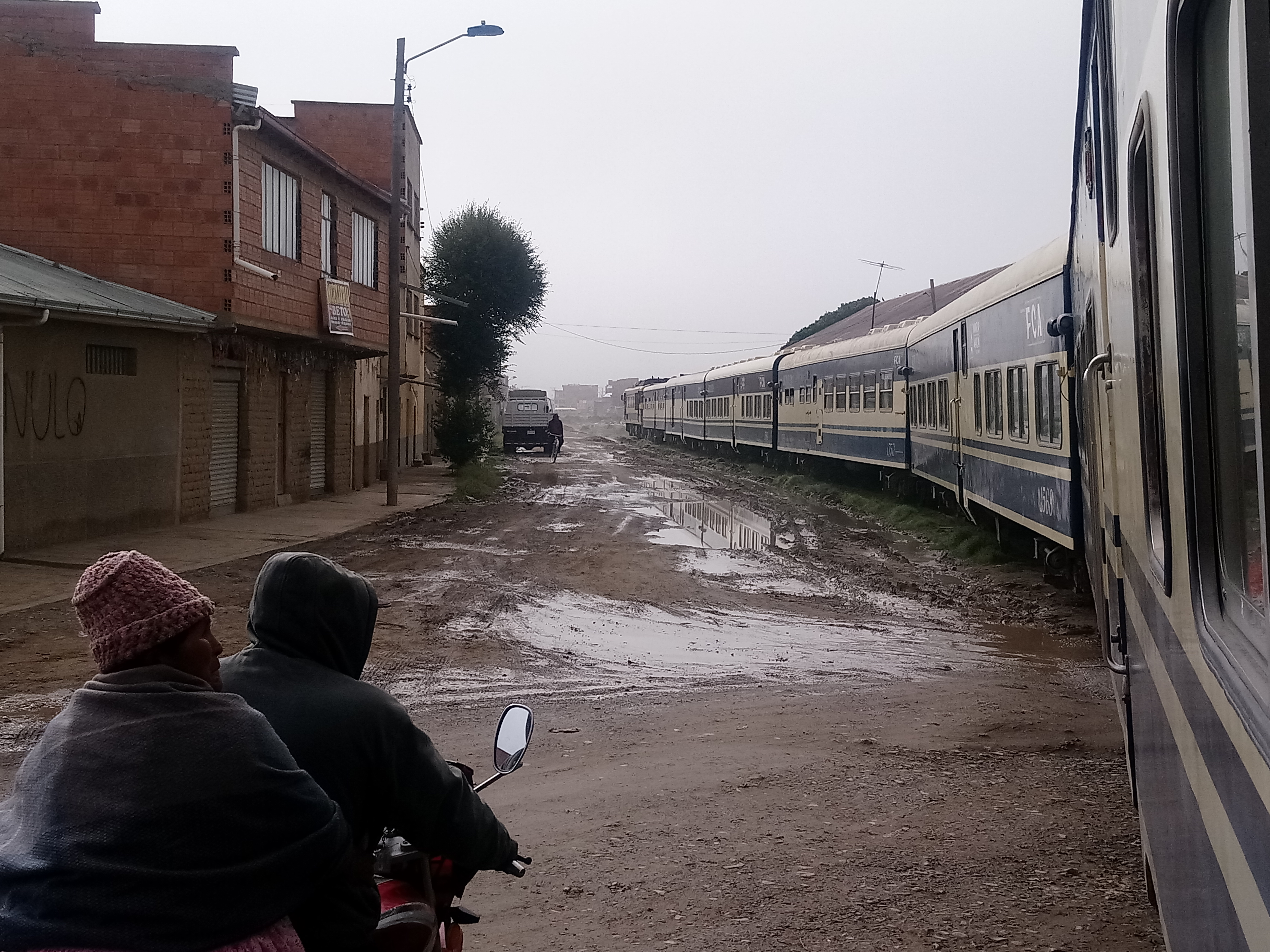 Ferrocarril Viacha Guaqui a su paso por áreas urbanas